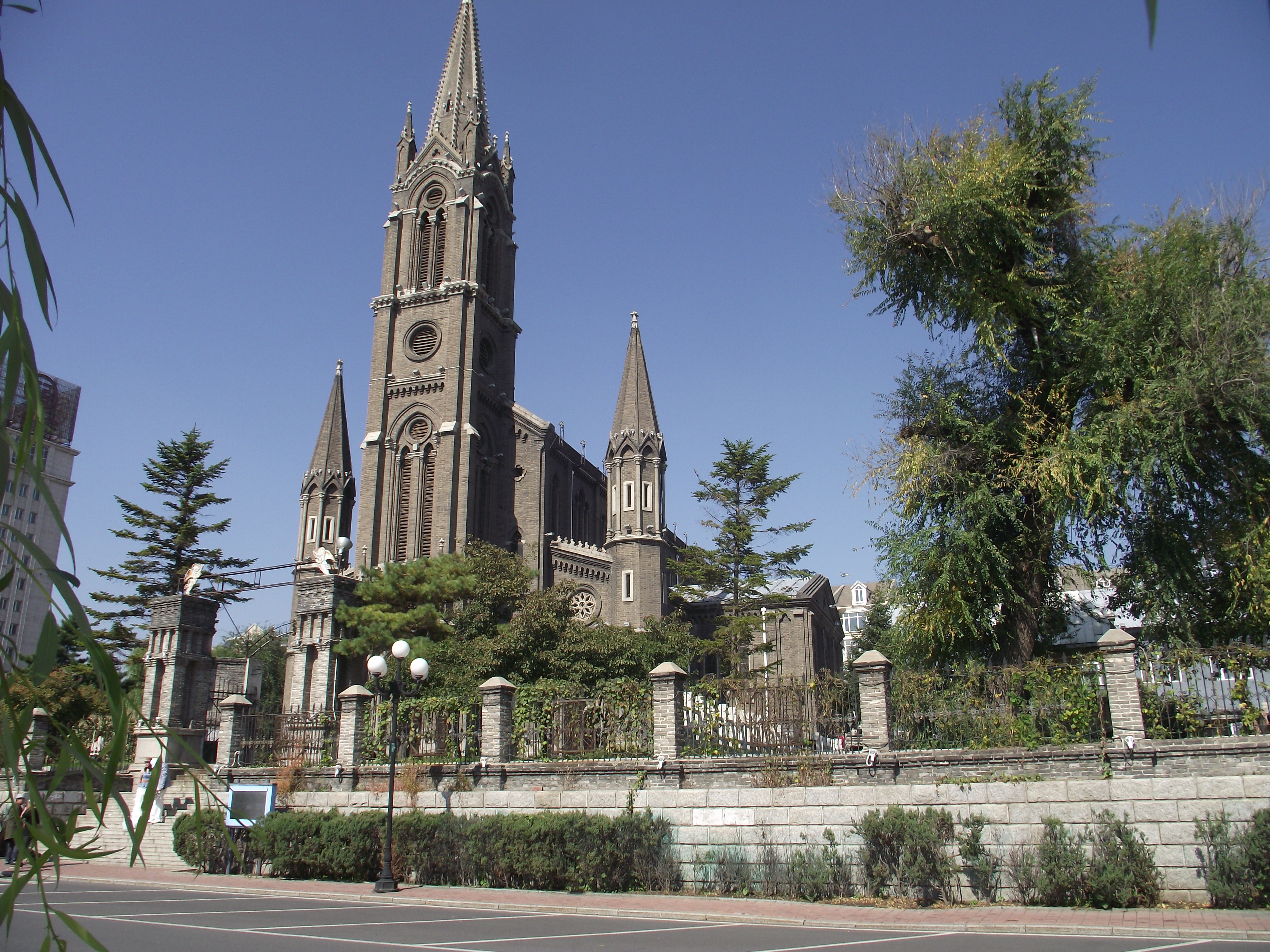 松花江景区教堂DSCF0161